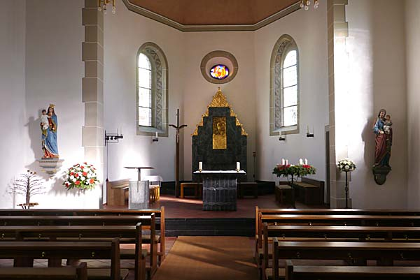 Innenaufnahme der Kirche St. Andreas in Klein-Winternheim nach der Innenraumrenovierung 2016